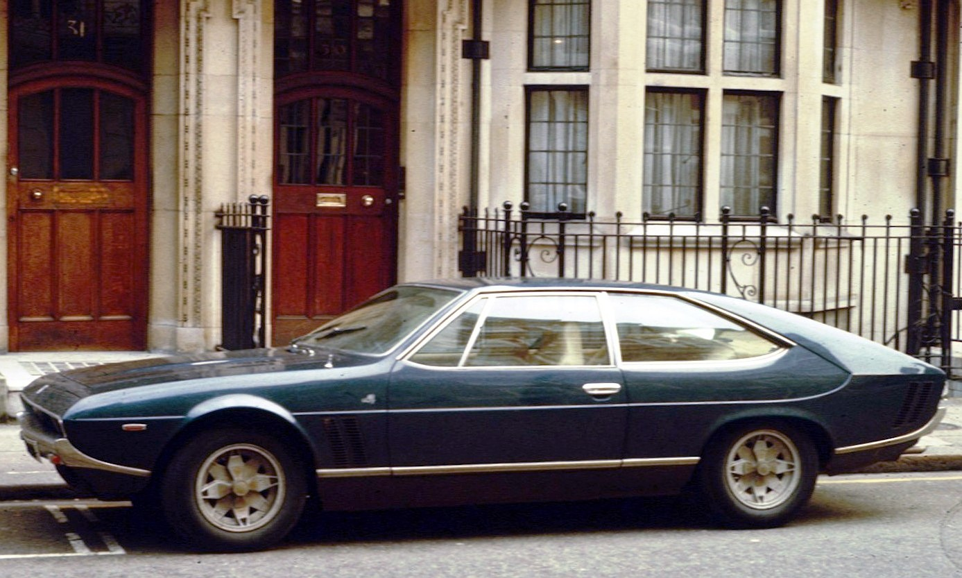 Iso Lele in London